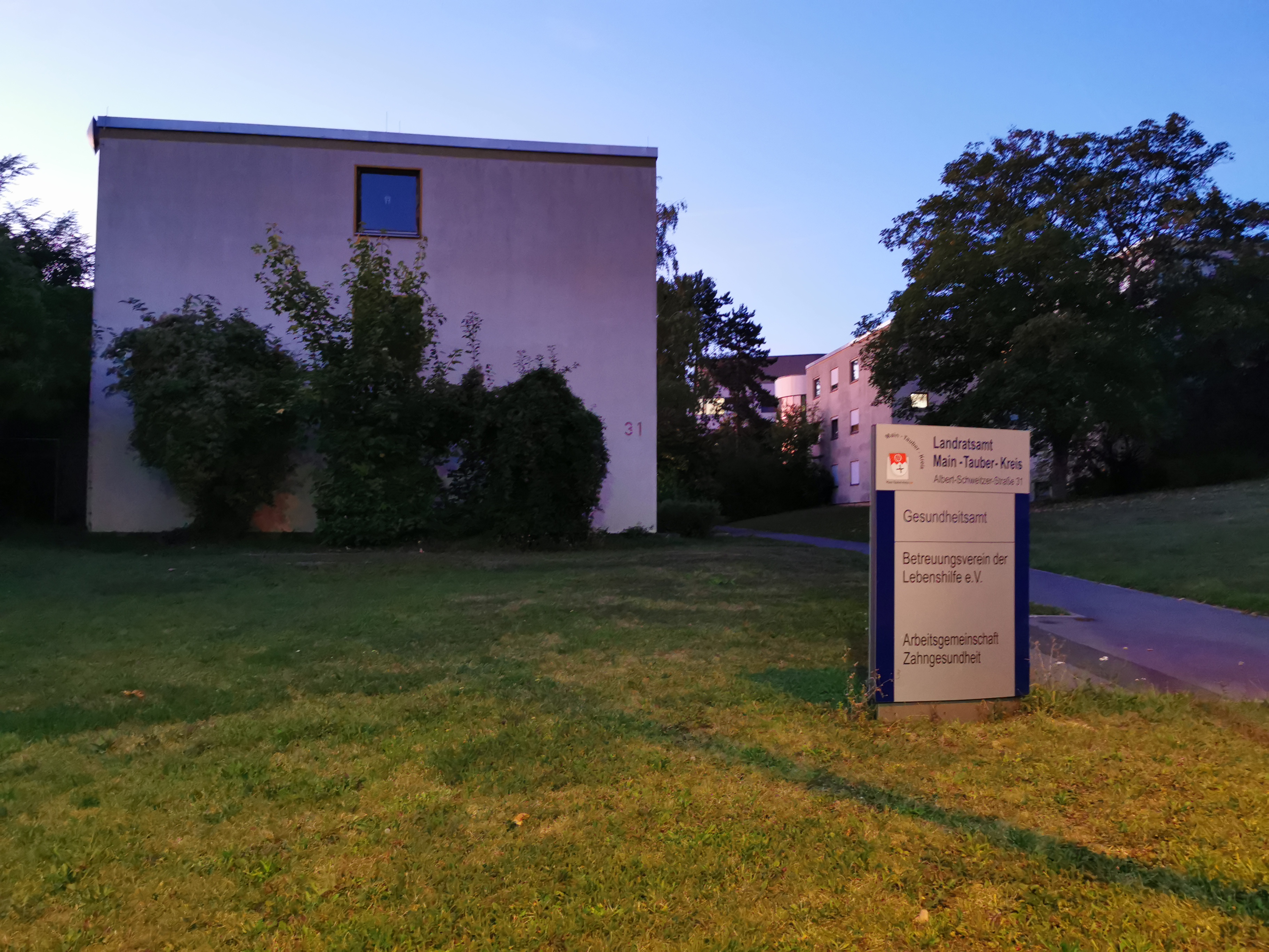 Landratsamt Main-Tauber-Kreis – Gesundheitsamt